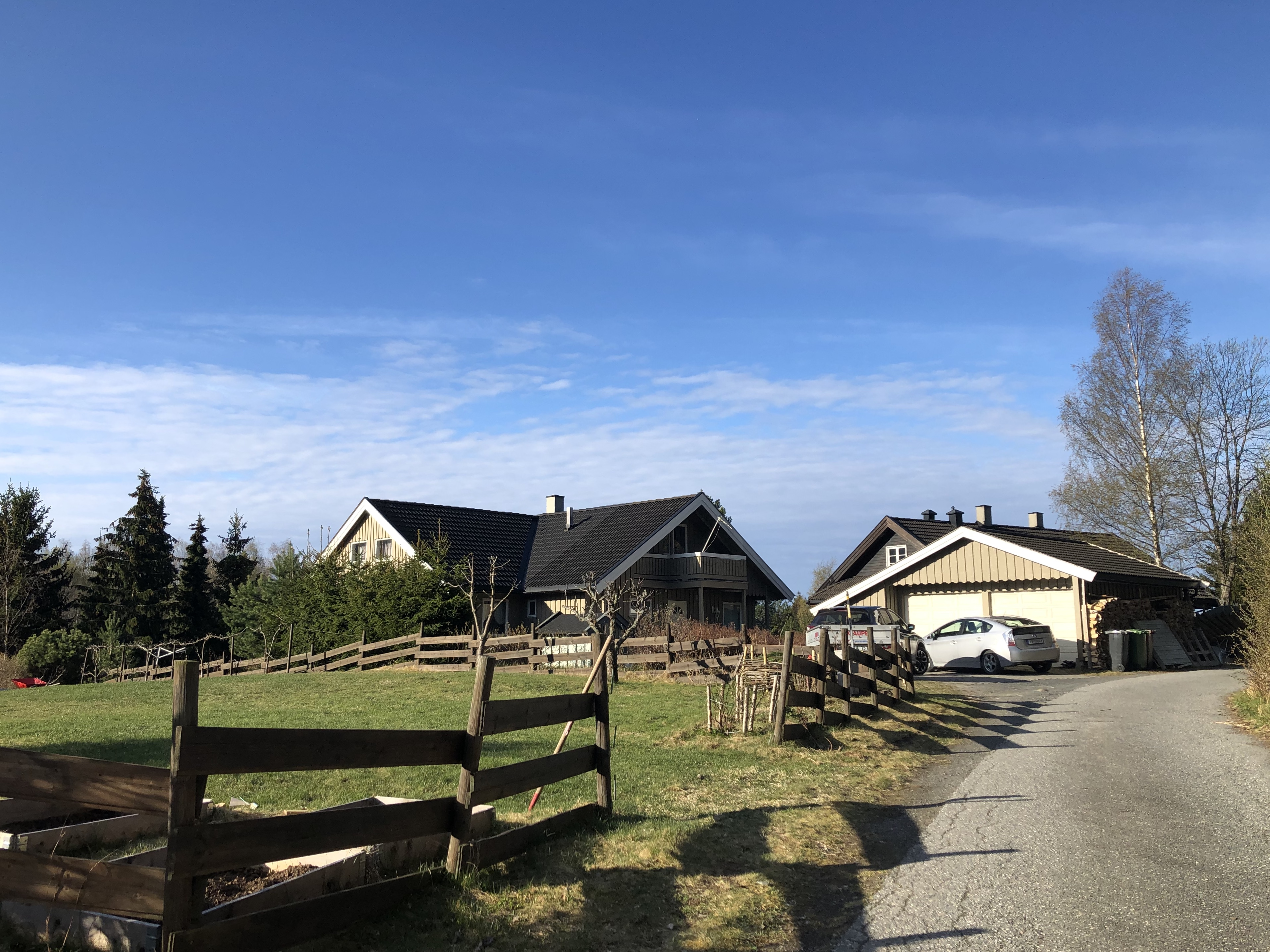 Bertelsbakken 6, Ringerike